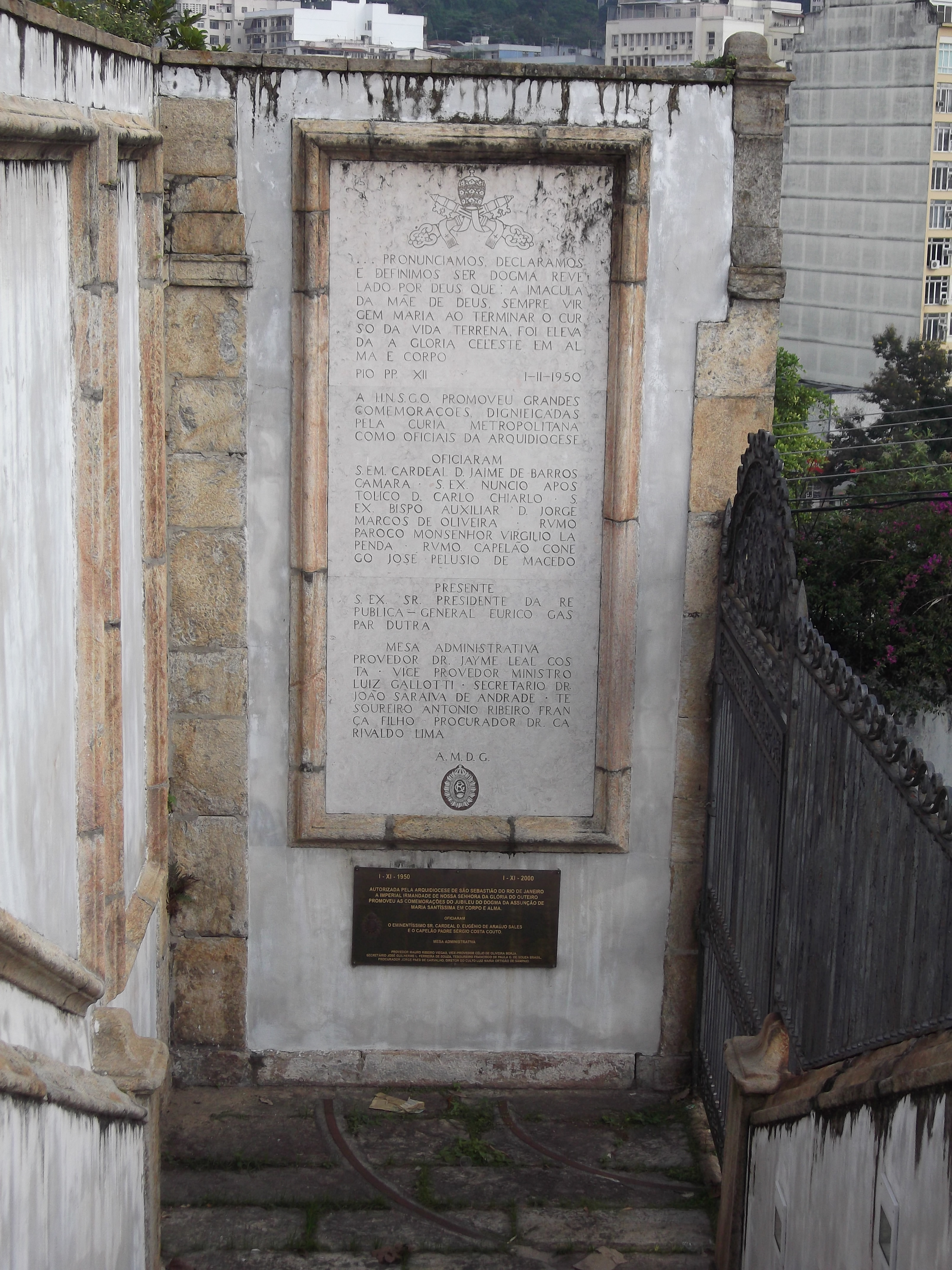 Igreja de Nossa Senhora da Glória no Rio de Janeiro : Escadaria : Placa memorial das celebrações pela Proclamação do Dogma da Assunção de Maria